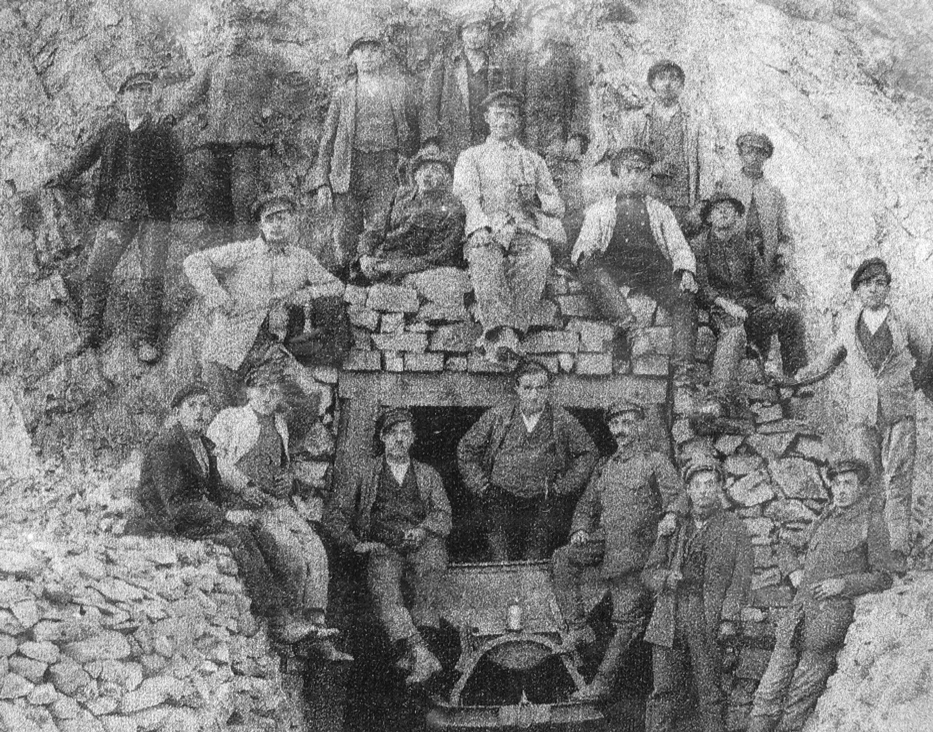 ehem. Kupfergrube "Wilhelmine" in Sommerkahl bei Aschaffenburg, Deutschland - Bergleute am Stollenmund um 1900